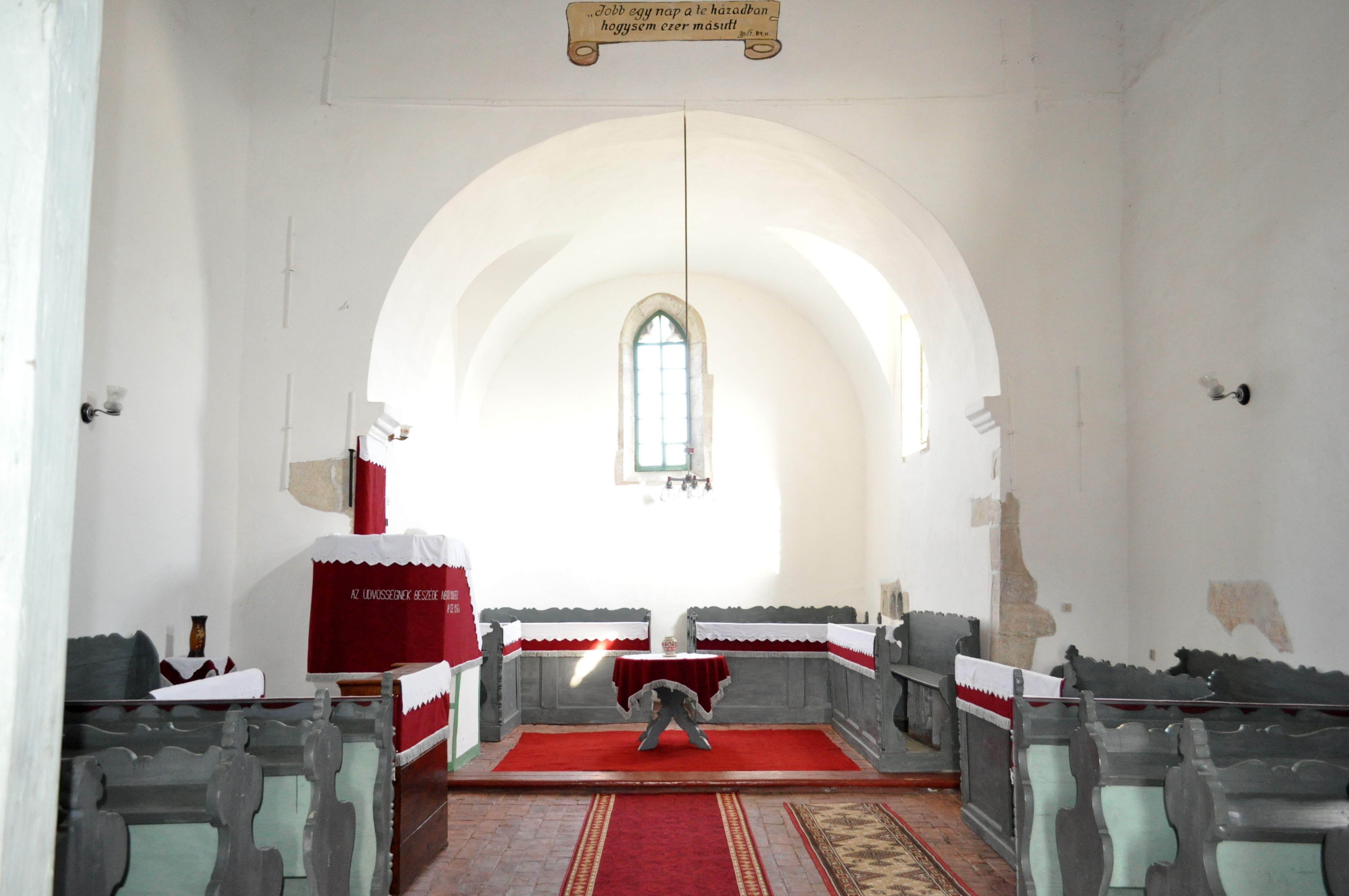 Biserica reformată, sat Șieu-Odorhei; comuna Șieu-Odorhei, județul Bistrița-Năsăud